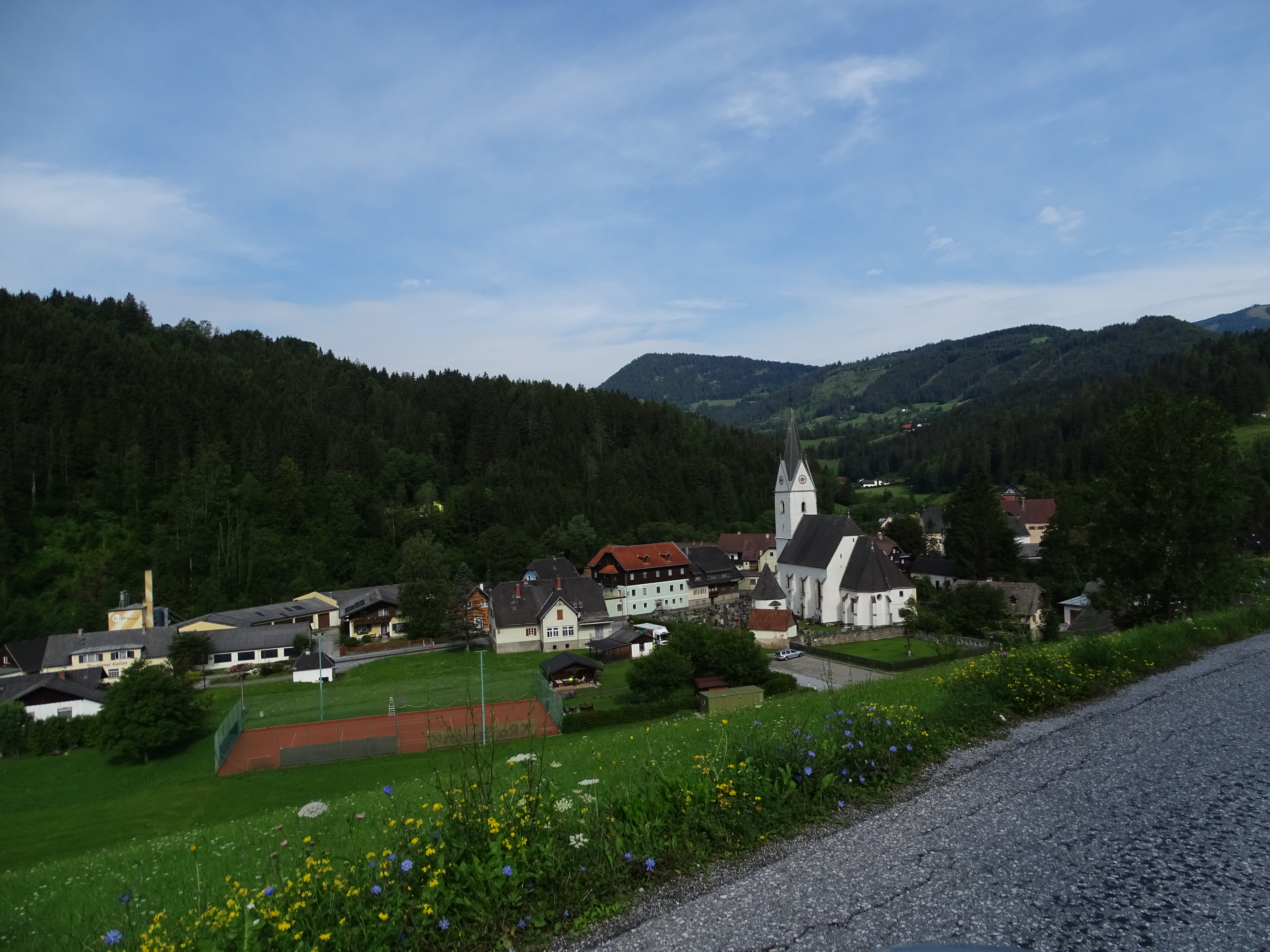 Blick von Westen auf den Hauptort von Geistthal in der Gemeinde Geistthal-Södingberg